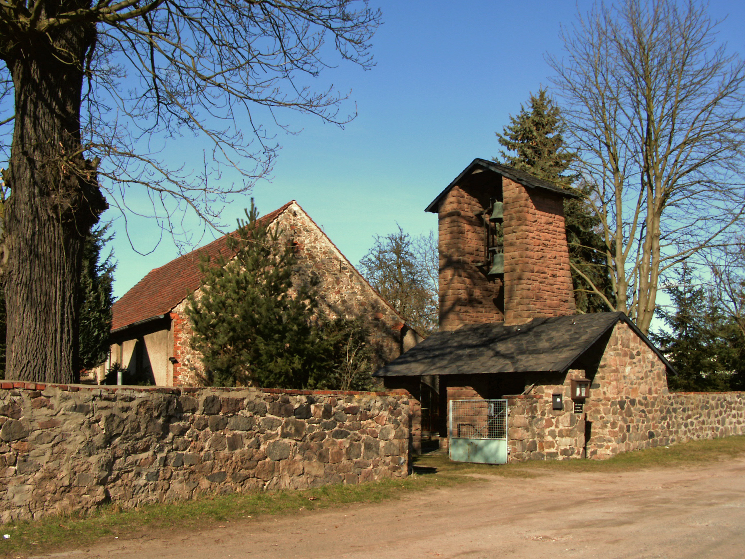 Katholische Kirche St. Nikolaus von der Flüe in Colbitz, Landkreis Börde